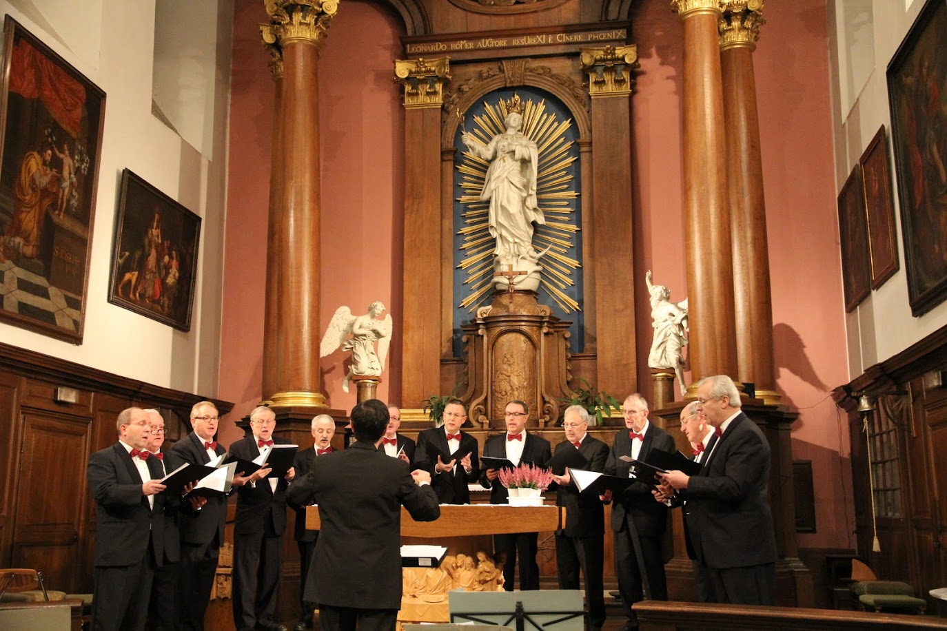 Konzert des Kgl. National Vokalensembles Männerquartett Eupen unter Leitung von Ludo Claesen